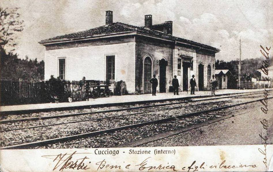 Cucciago, la stazione ferroviaria. L'immagine è anteriore al 1939, data dell'attivazione dell'esercizio a trazione elettrica.